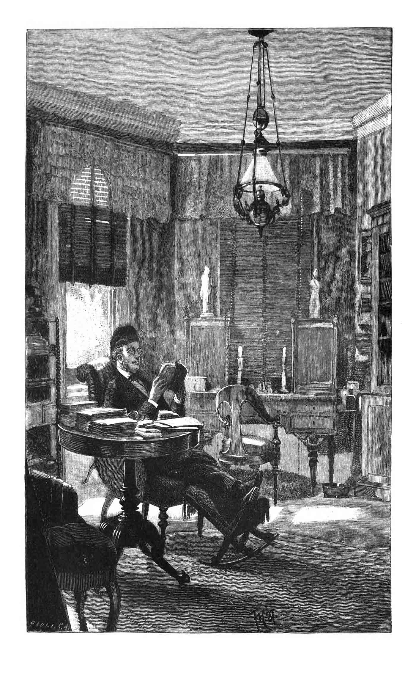 Meïr Aron Goldschmidt, Danish author (1819-1887)